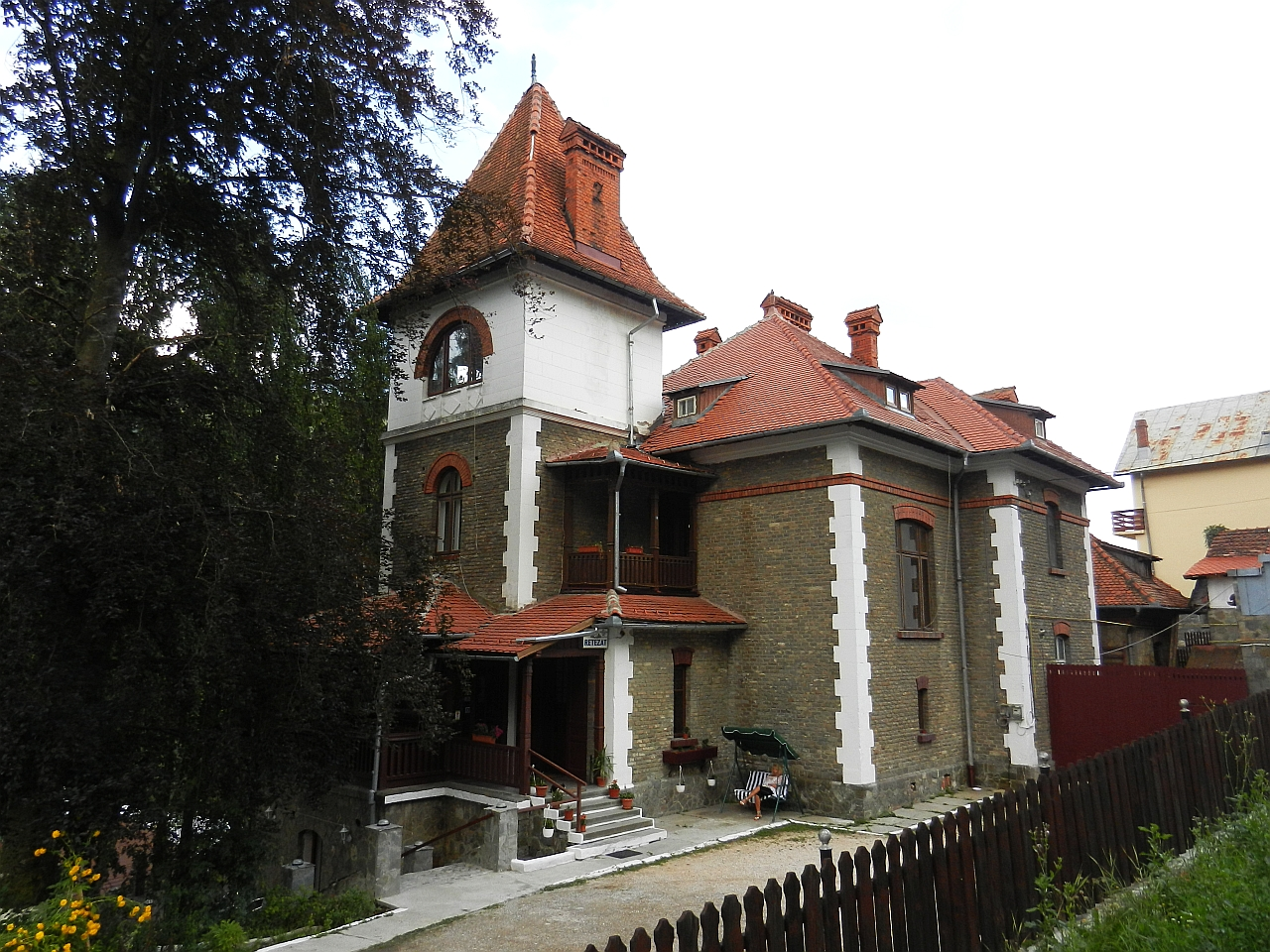 Vila Simu - Vila "Retezat"